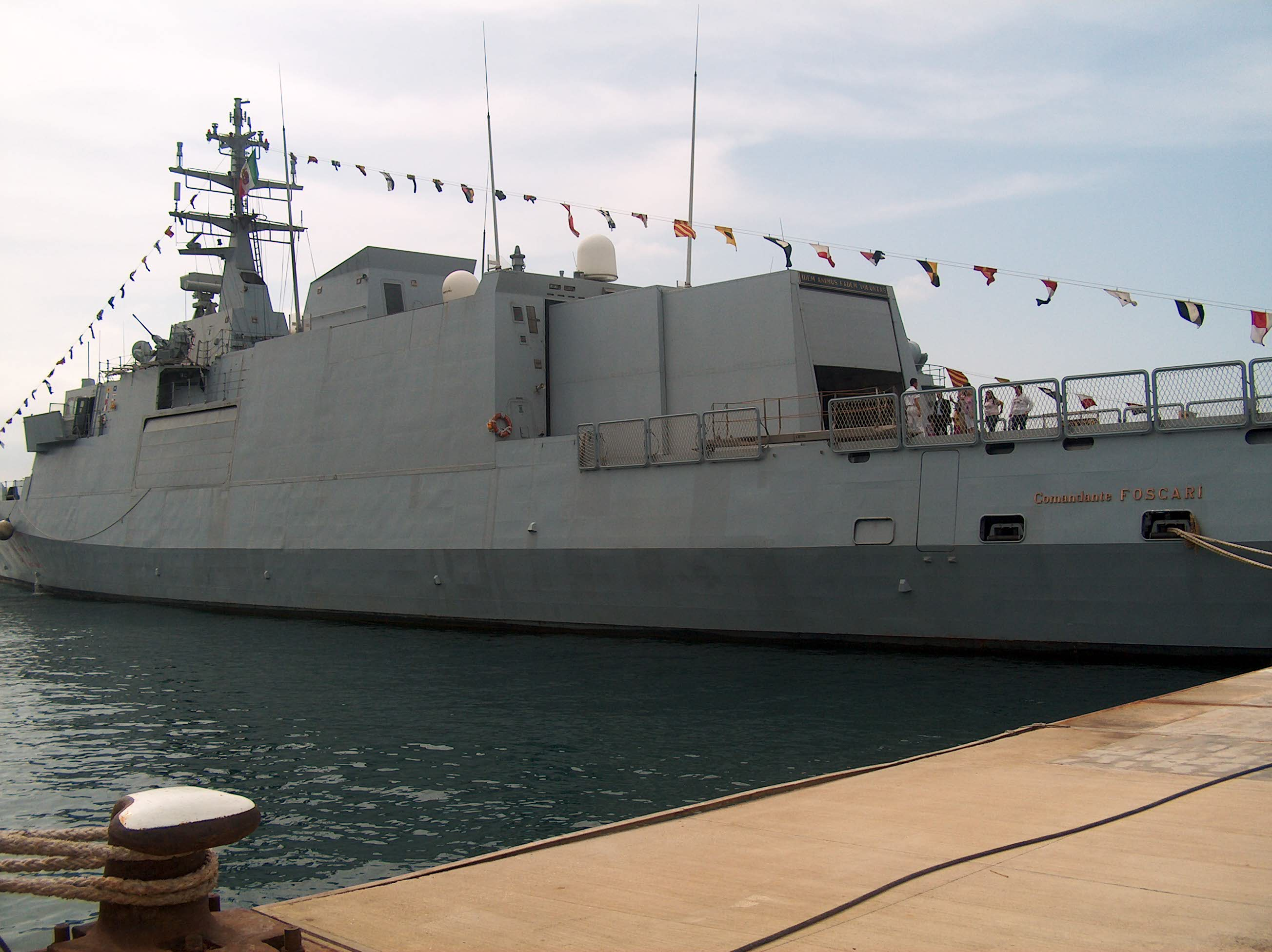 La linea a bassa osservabilità del pattugliatore Comandante Foscari, con l'hangar telescopico in evidenza